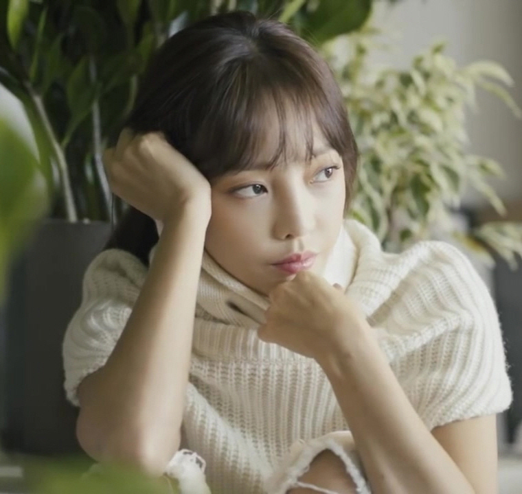 (Marie Claire Korea) 카메라 밖의 구하라